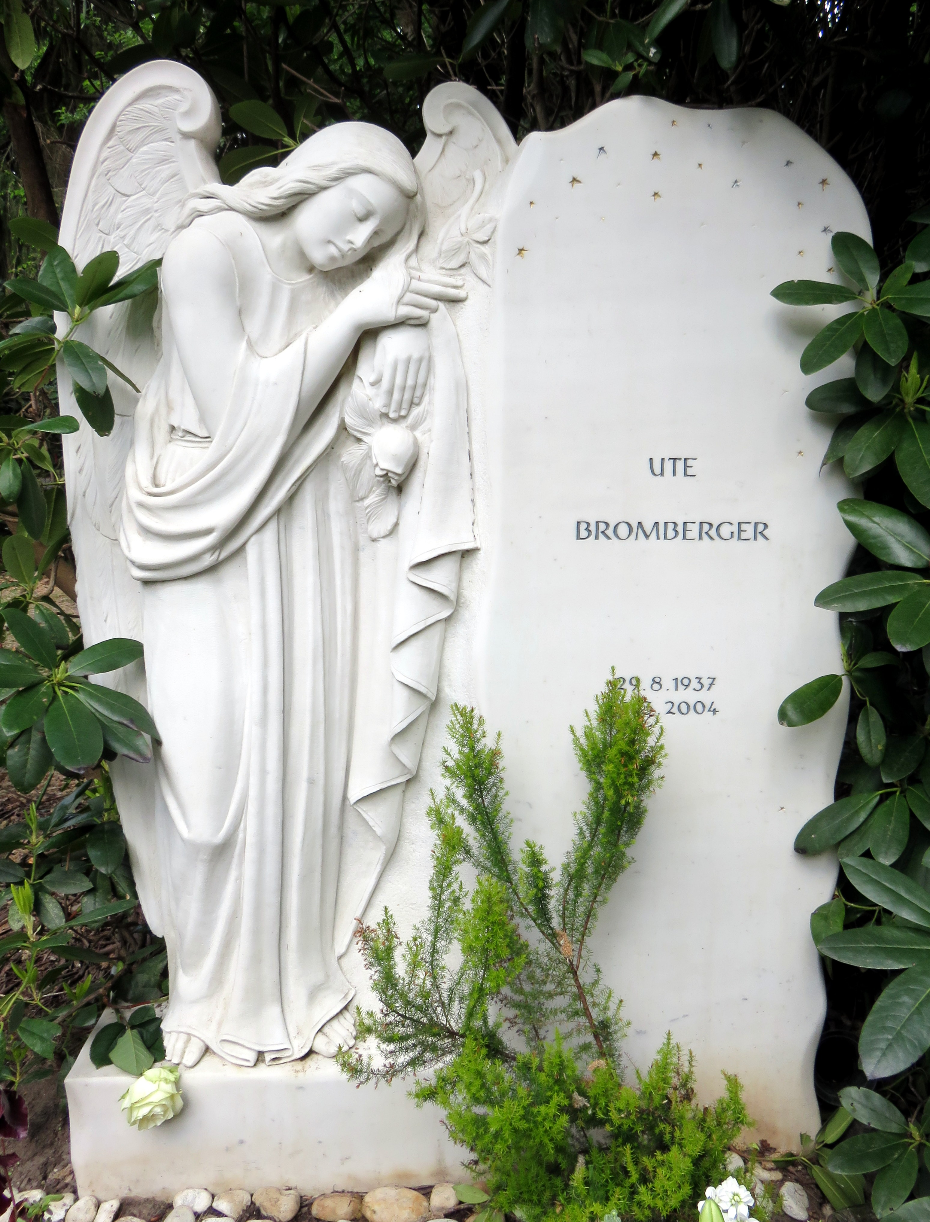 Grabstein der deutschen Journalistin und ehemaligen Leiterin des NDR-Frauenfunks Ute Bromberger, Friedhof Ohlsdorf, Planquadrat R6, 191-93 (oberhalb Althamburgischer Gedächtnisfriedhof). Das Grabmal wurde 2004 vom Bildhauer Arthur Schmalhofer geschaffen.